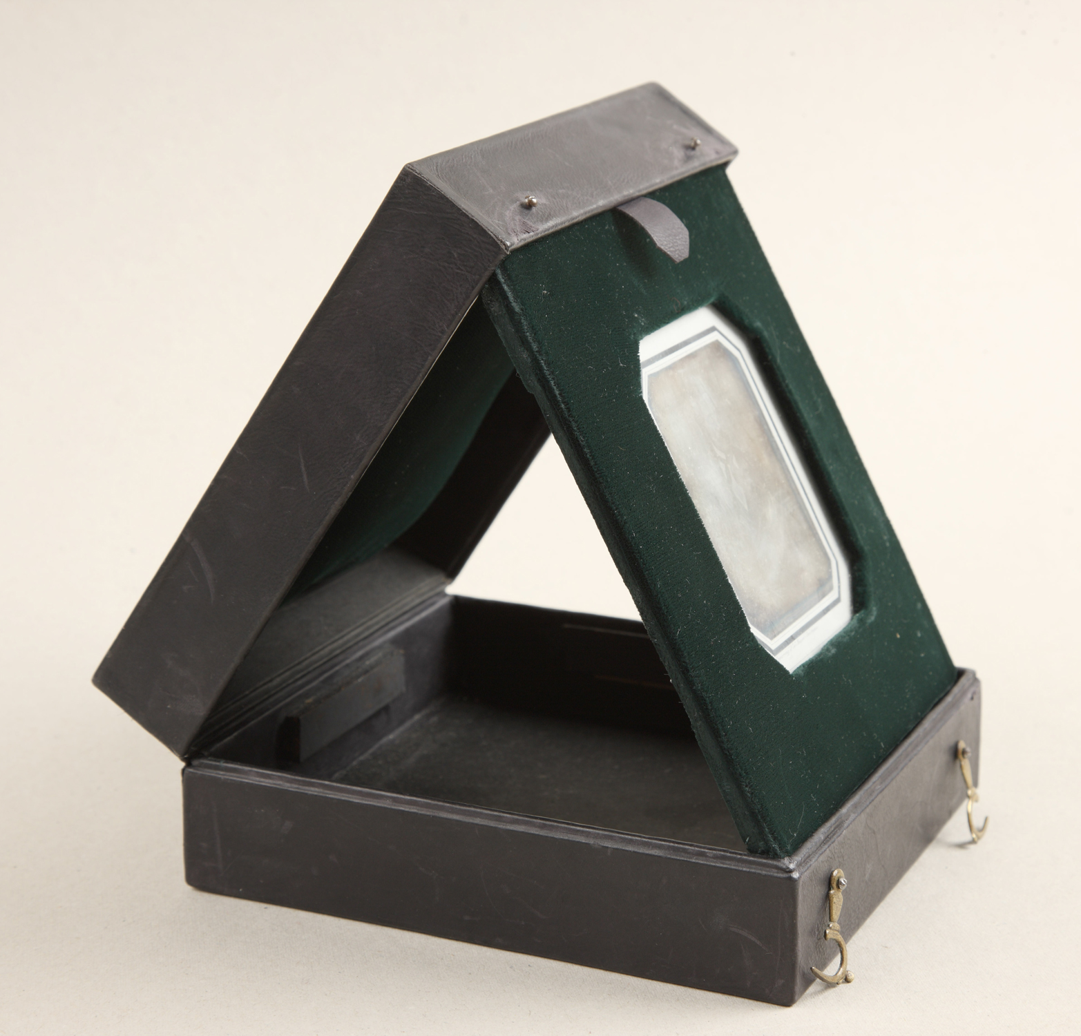 Dagerrotüüp Eesti Rahvusarhiivi kollektsioonis. [1] Daguerreobase: EAA.1862.2.472.3 1840-1860